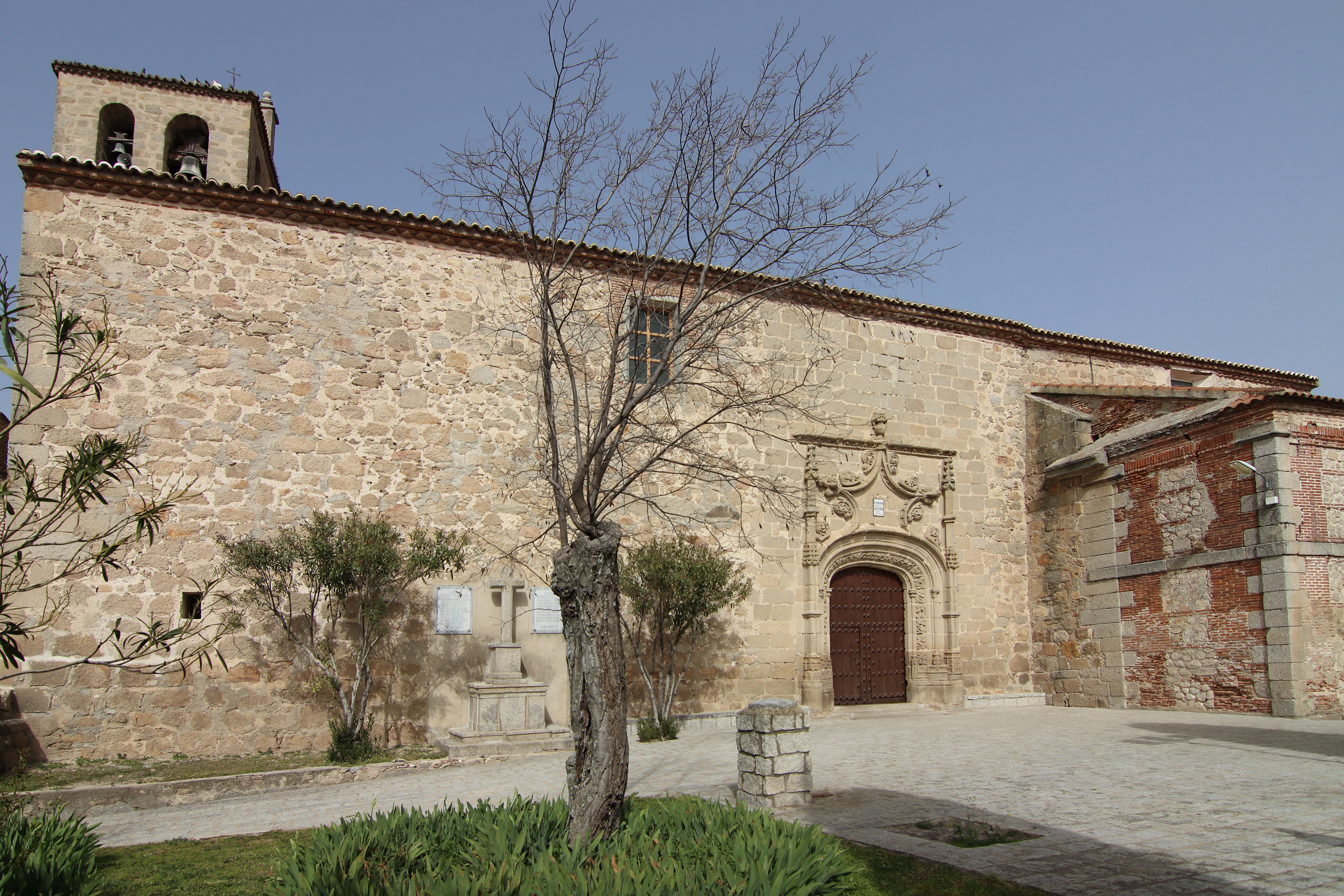 Iglesia de la Asunción de Nuestra Señora, Nombela, fachada principal, 02